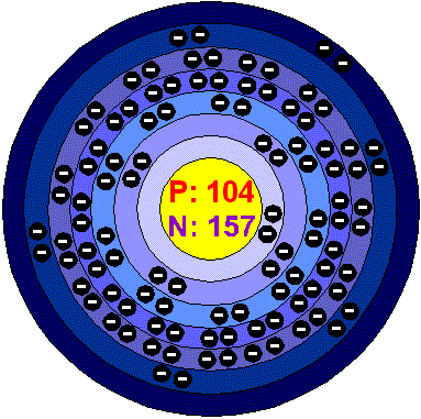 Резерфордий атомы